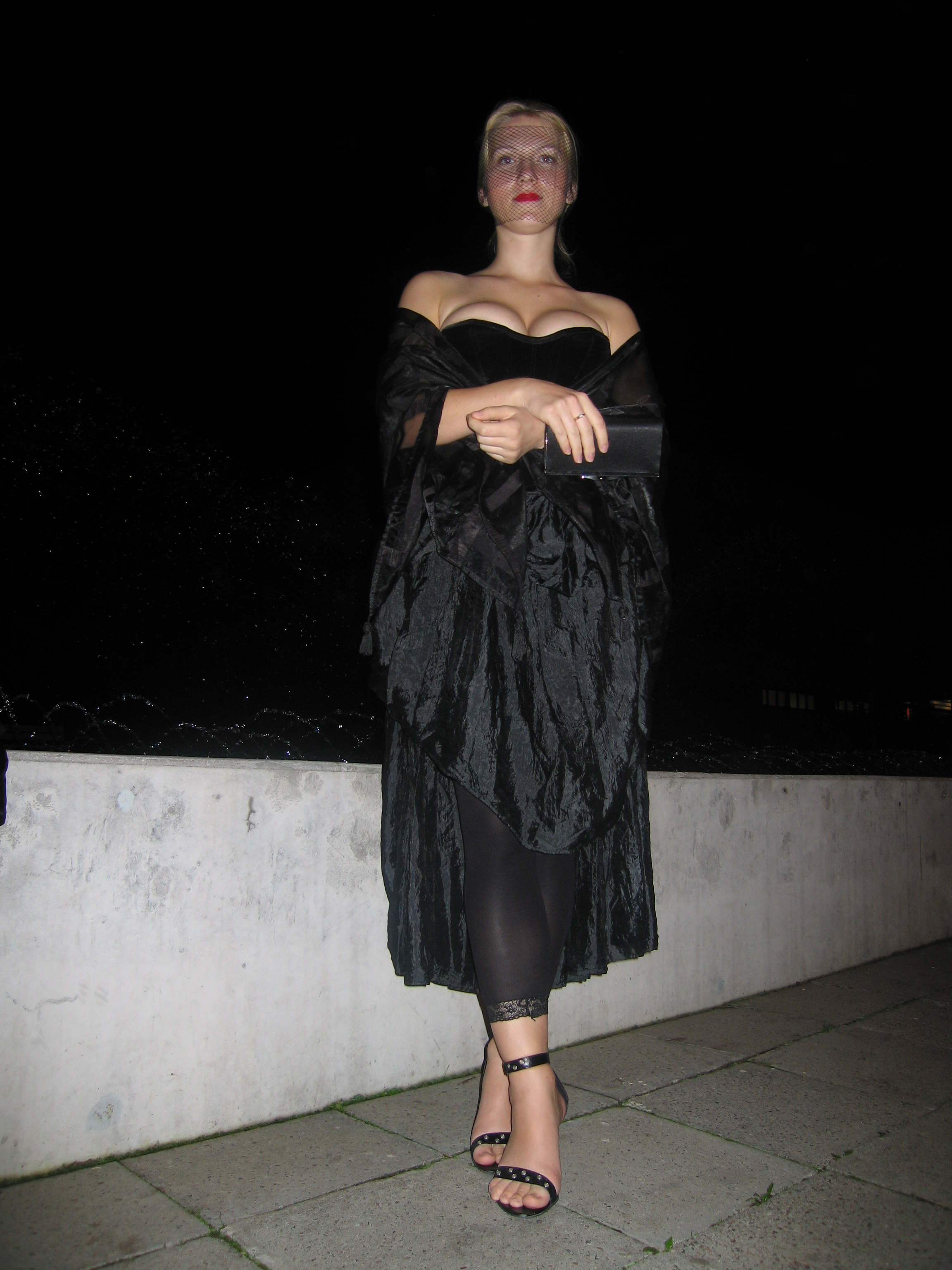 Nadežda Tšernobai Eesti Teatri Festival 2008 “UNT!” avaüritusel (ballil) “Öös on asju” Vanemuise suures majas.Foto: Robert Treufeldt